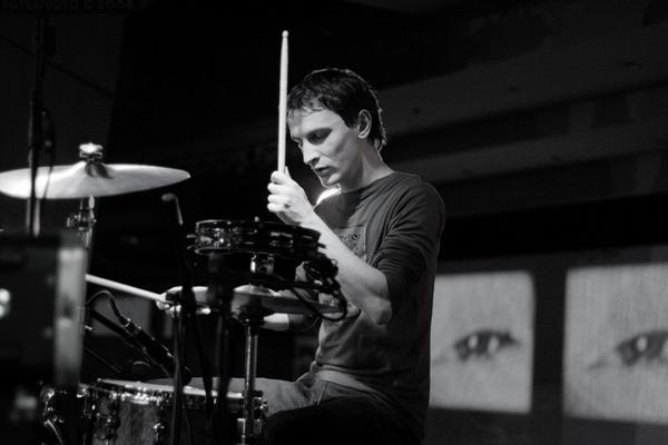 Константин во время концерта для A1TV, Горбушка, Москва.